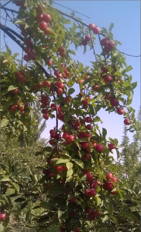 محصولات باغی شهر گهواره تابستان93